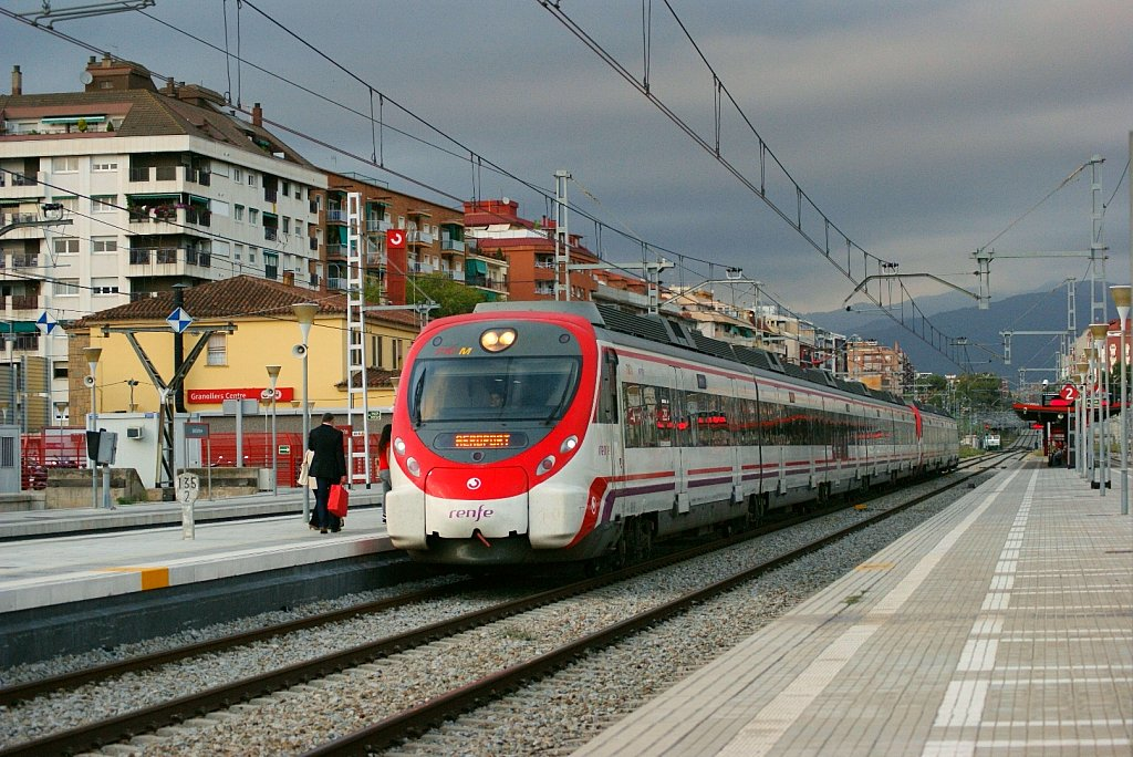 Unitats civia sortint de l'estació de Granollers-Centre realitzant un servei de la R2 amb destinació l'Aeroport de Barcelona.